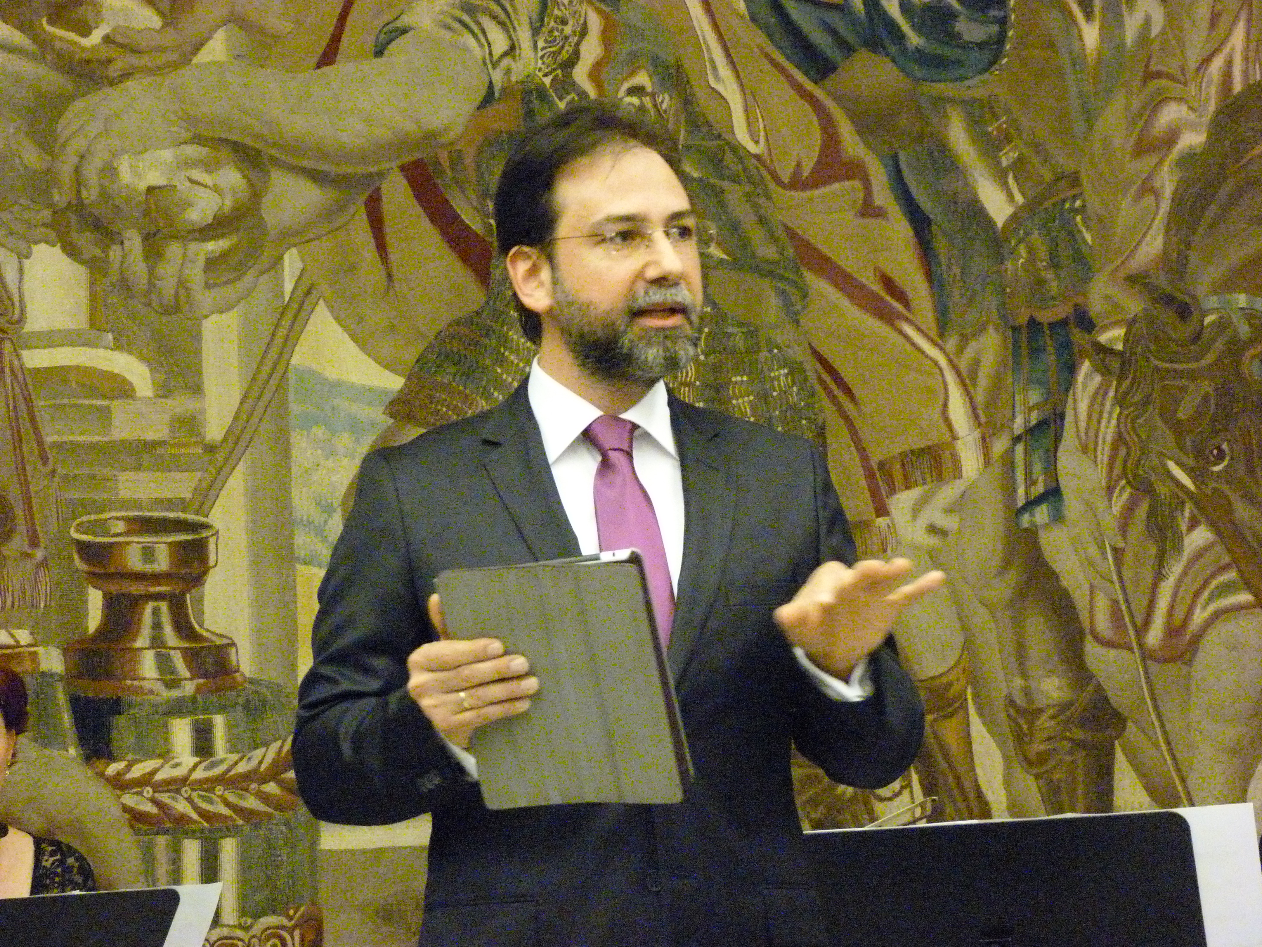 A felvételek 2014. április 23 –án szerdán készültek Budapesten, az Országos Széchenyi Könyvtárban. A Török Köztársaság Magyarországi Nagykövete, Szőcs Géza miniszterelnöki főtanácsadó, Fodor Pál Magyar Tudományos Akadémia Bölcsészettudományi Kutatóközpontja, a Yunus Emre Enstitüte elnökhelyettese, a Yunus Emre Enstitüte igazgatója, Káldos János az Országos Szécheniy Könyvtár megbízott főigazgatója.